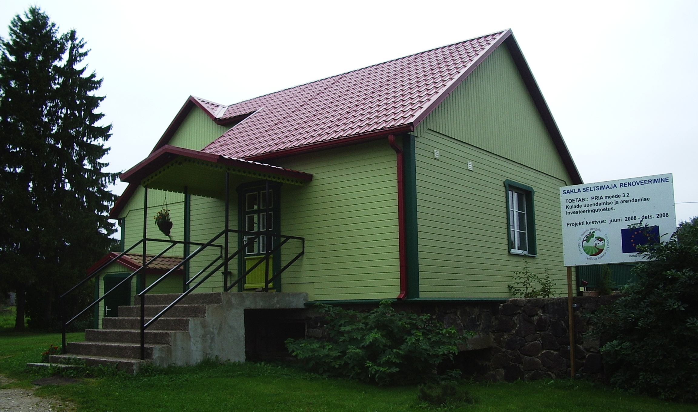 Sakla seltsimaja